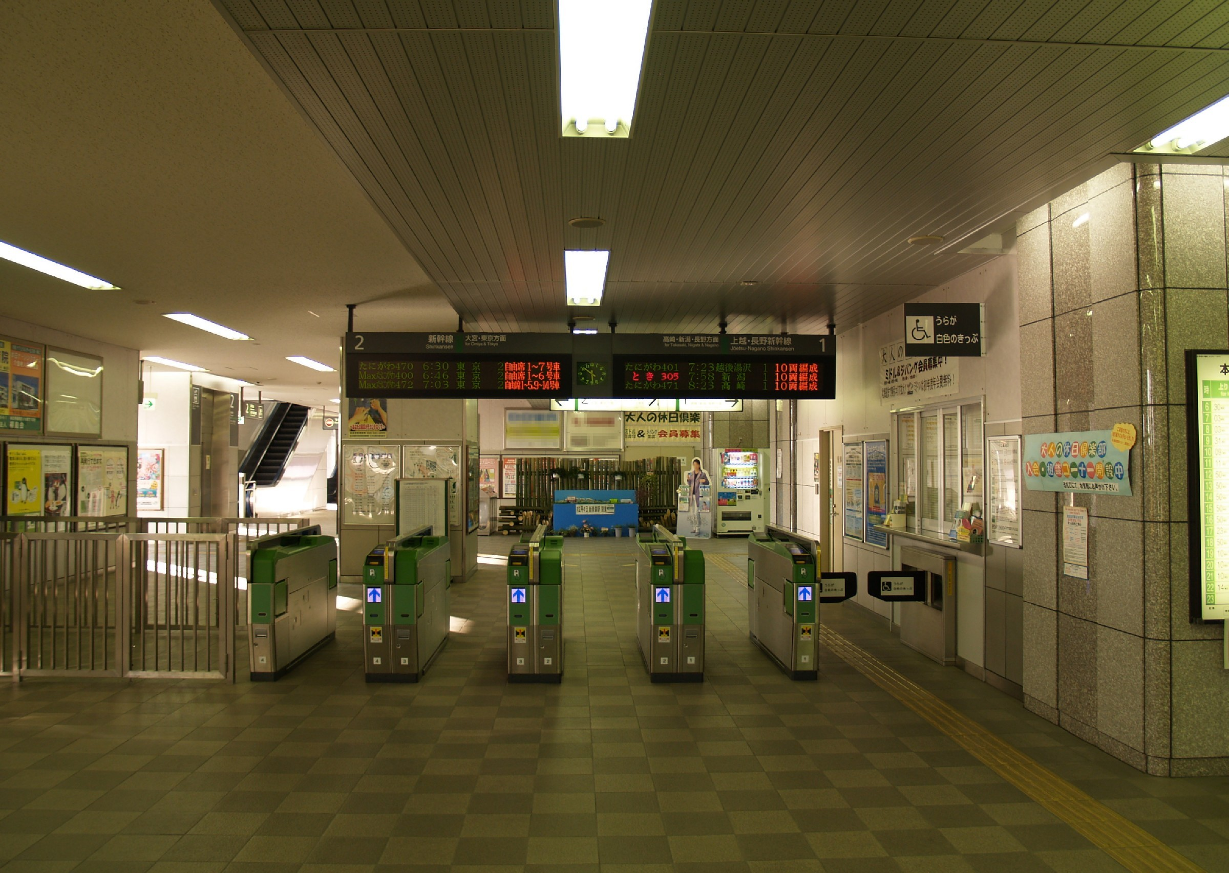 本庄早稲田駅改札口